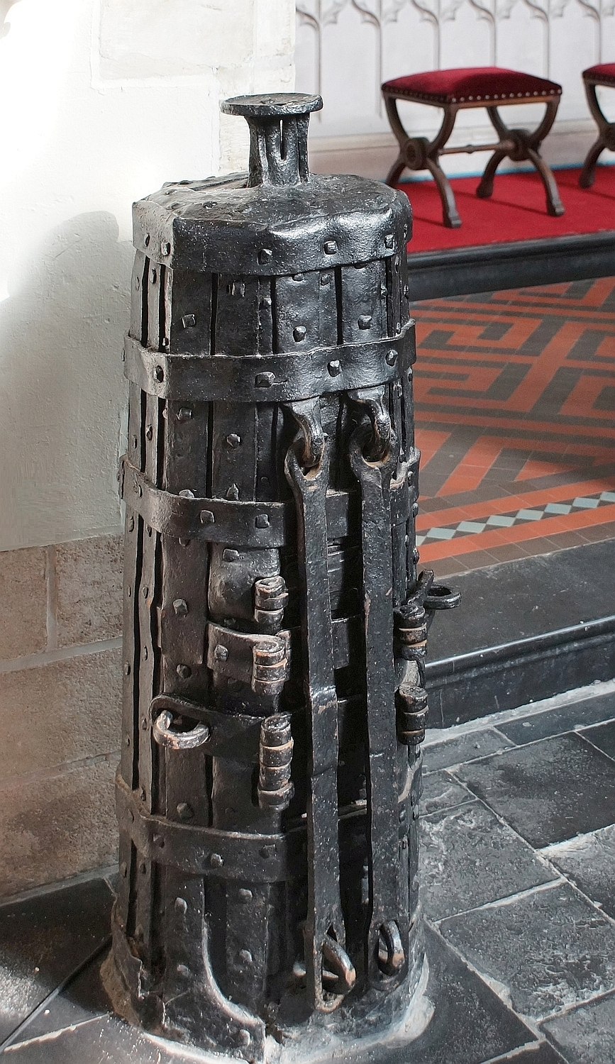 16-de eeuwse offerblok.